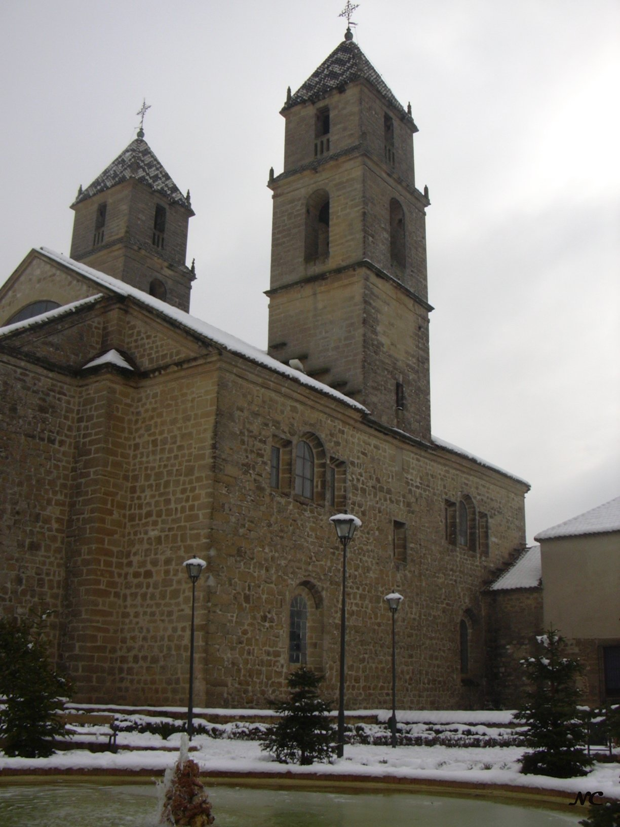 Patio trasero del Hospital de Santiago, Úbeda(Jaén), construido en el año 2006 sobre un antiguo cine de verano.